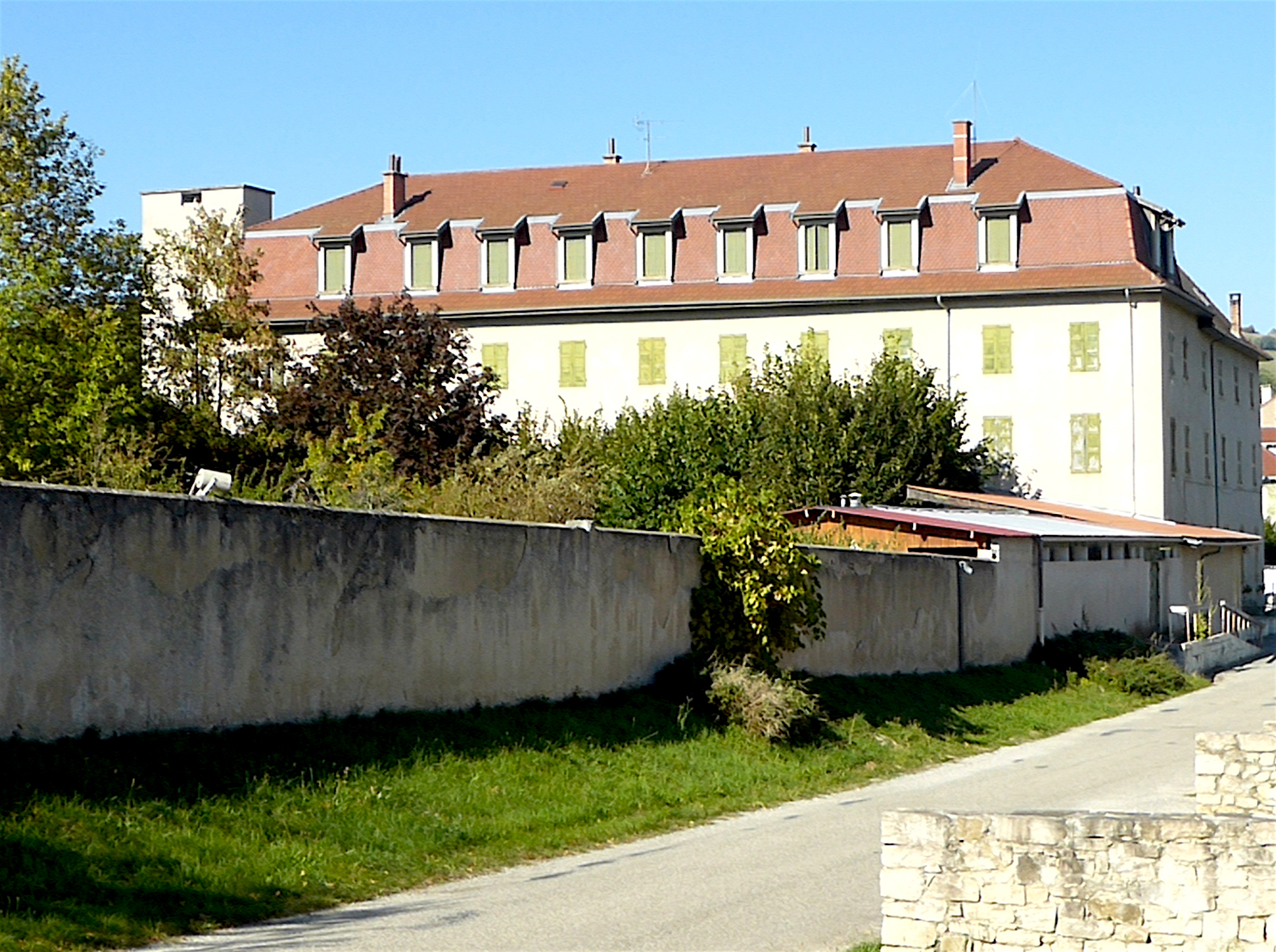 Couvent des Missionnaires Oblats de Marie Immaculée Notre-Dame-de-l'Osier, Isère, France. Septembre 2016